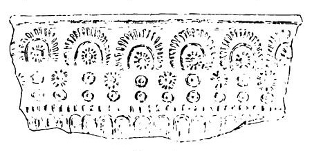 Atelier de Saint-Rémy-en-Rollat, Allier. Fragment de moule de forme Déch. 29. Dessin tiré de Joseph Déchelette, Les vases céramiques ornés de la Gaule romaine (Narbonnaise, Aquitaine et Lyonnaise), vol. 1, 1904, p. 49, fig. 43.